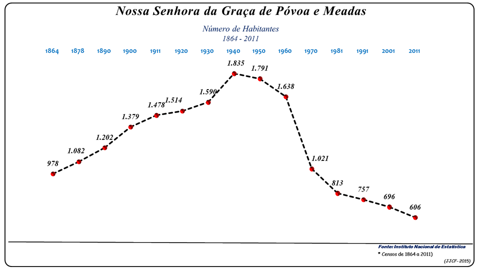 Evolução da População